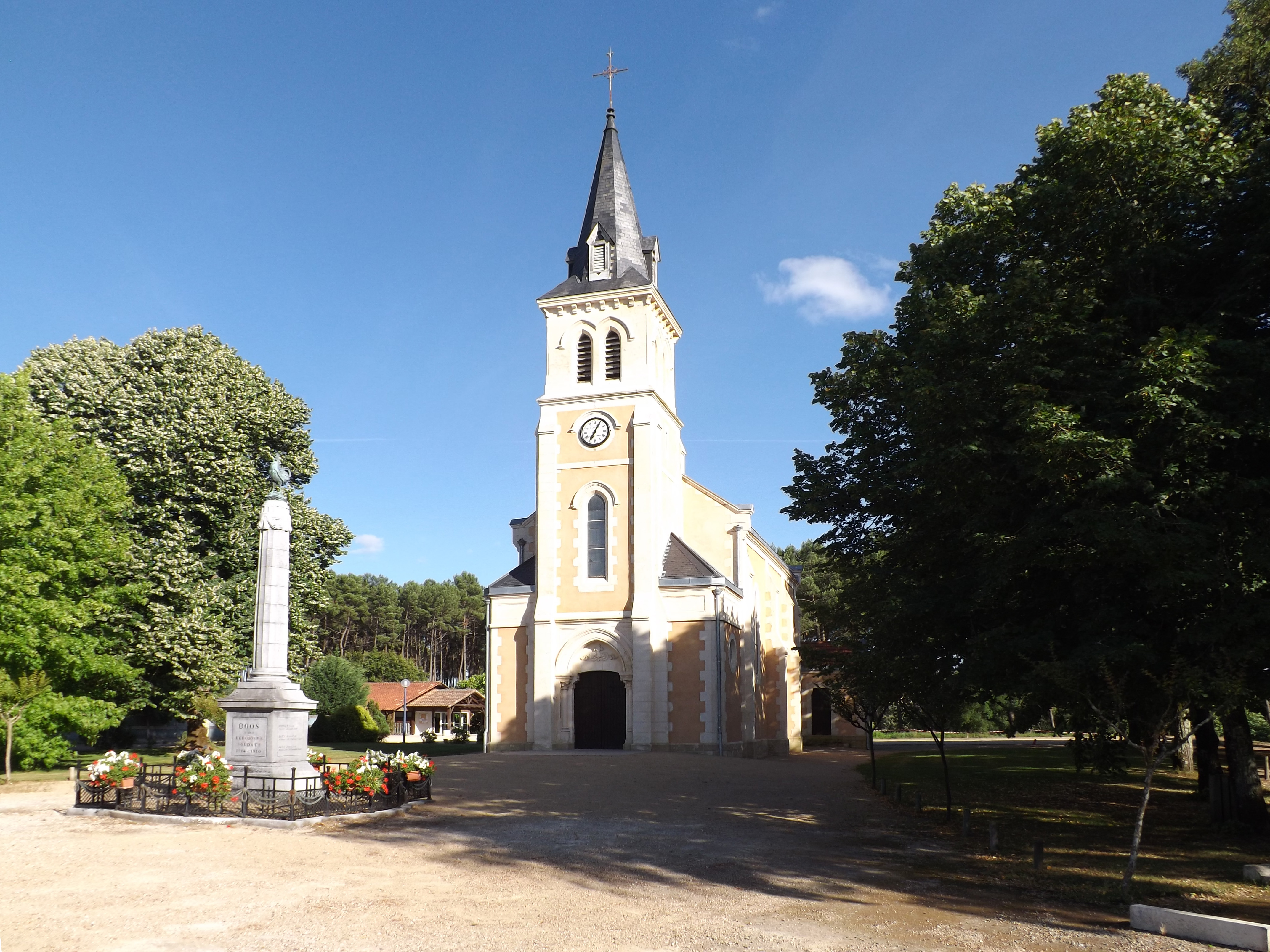 Glèisa de sent Pèr de Bòsc, Lanas, Gasconha